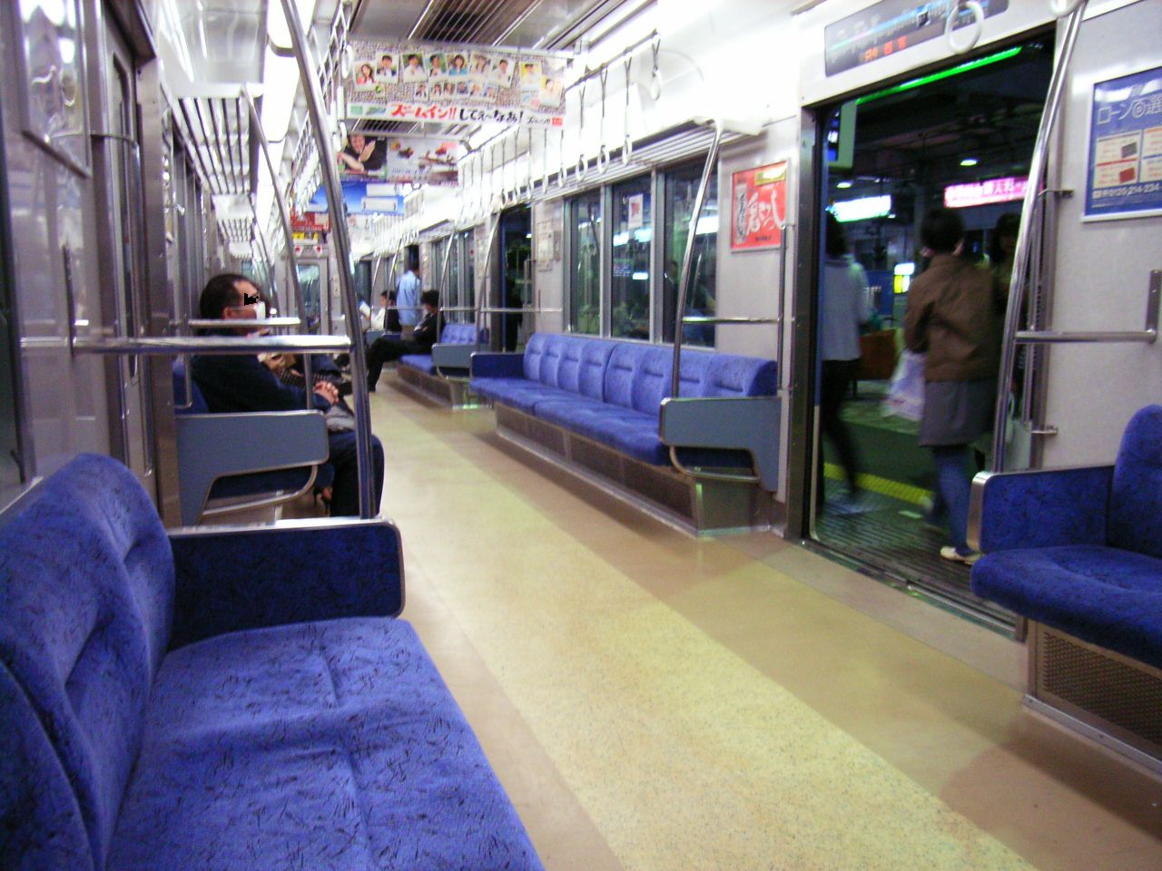 西宮駅停車中のja:阪神5500系電車の車内。